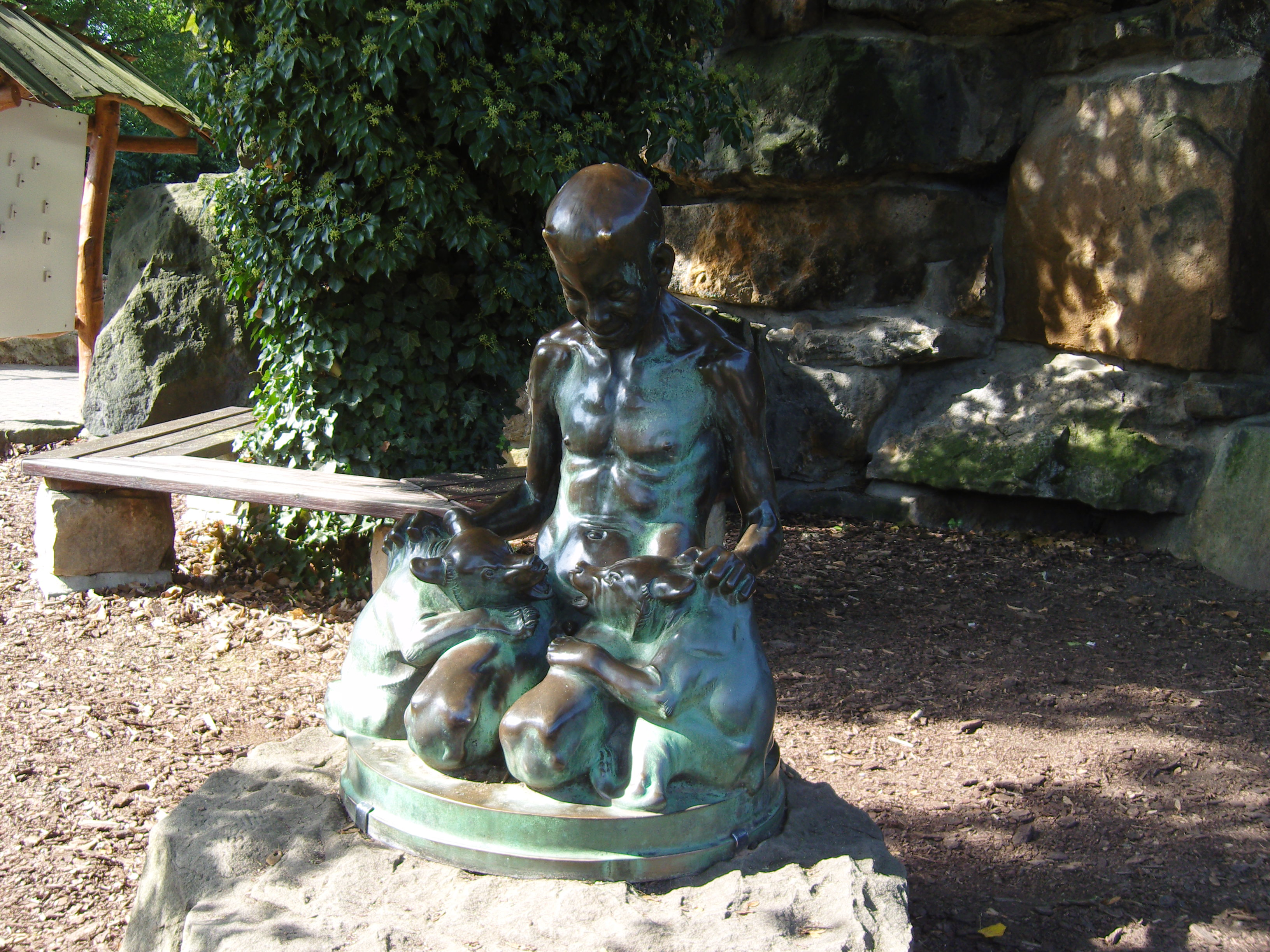 Bronzeplastik von Otto Pilz im Zoo Dresden, dargestellt ist ein Faun mit zwei jungen Bären